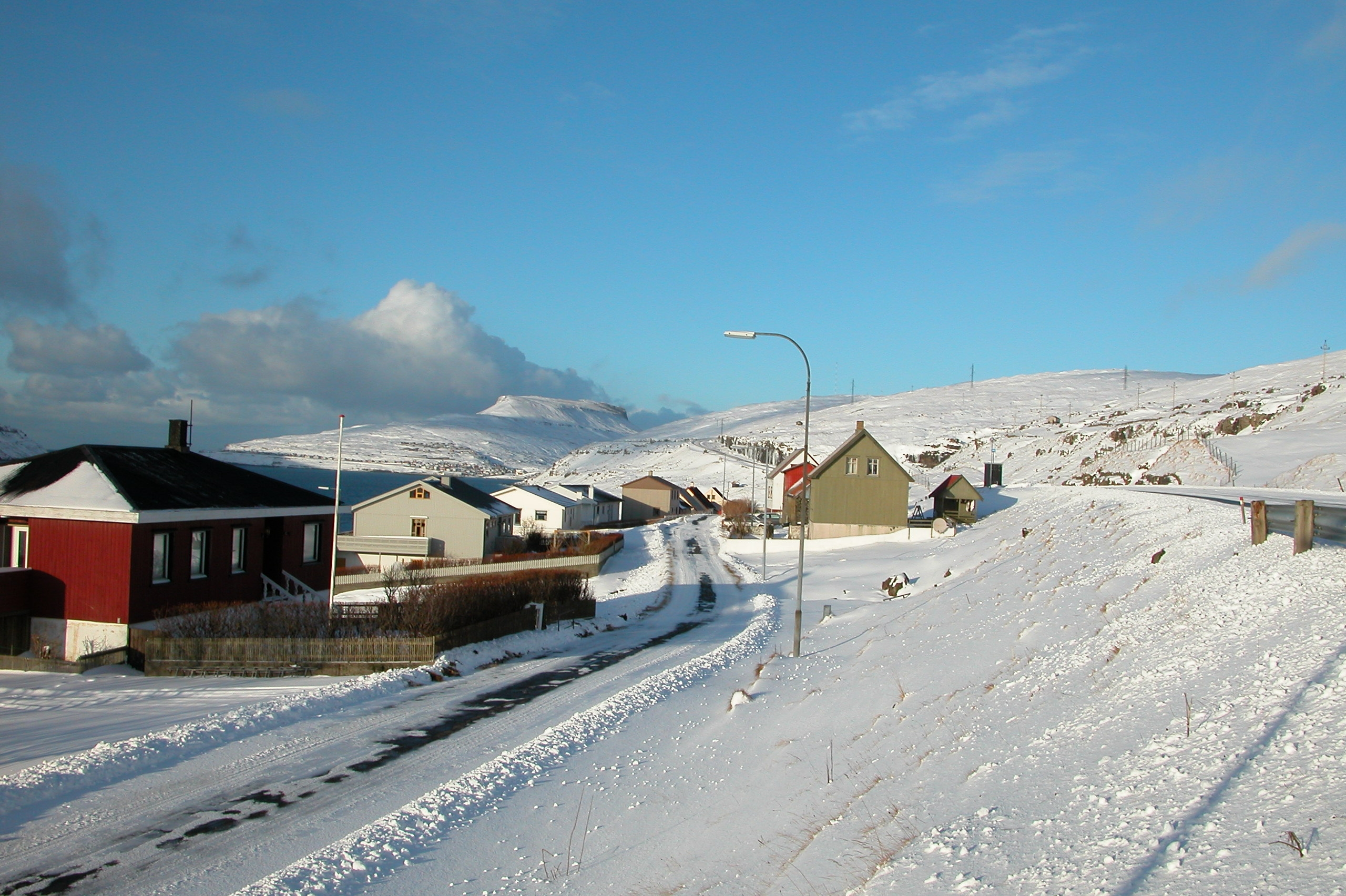 Ljósá in Eysturoy, Faroe Islands.